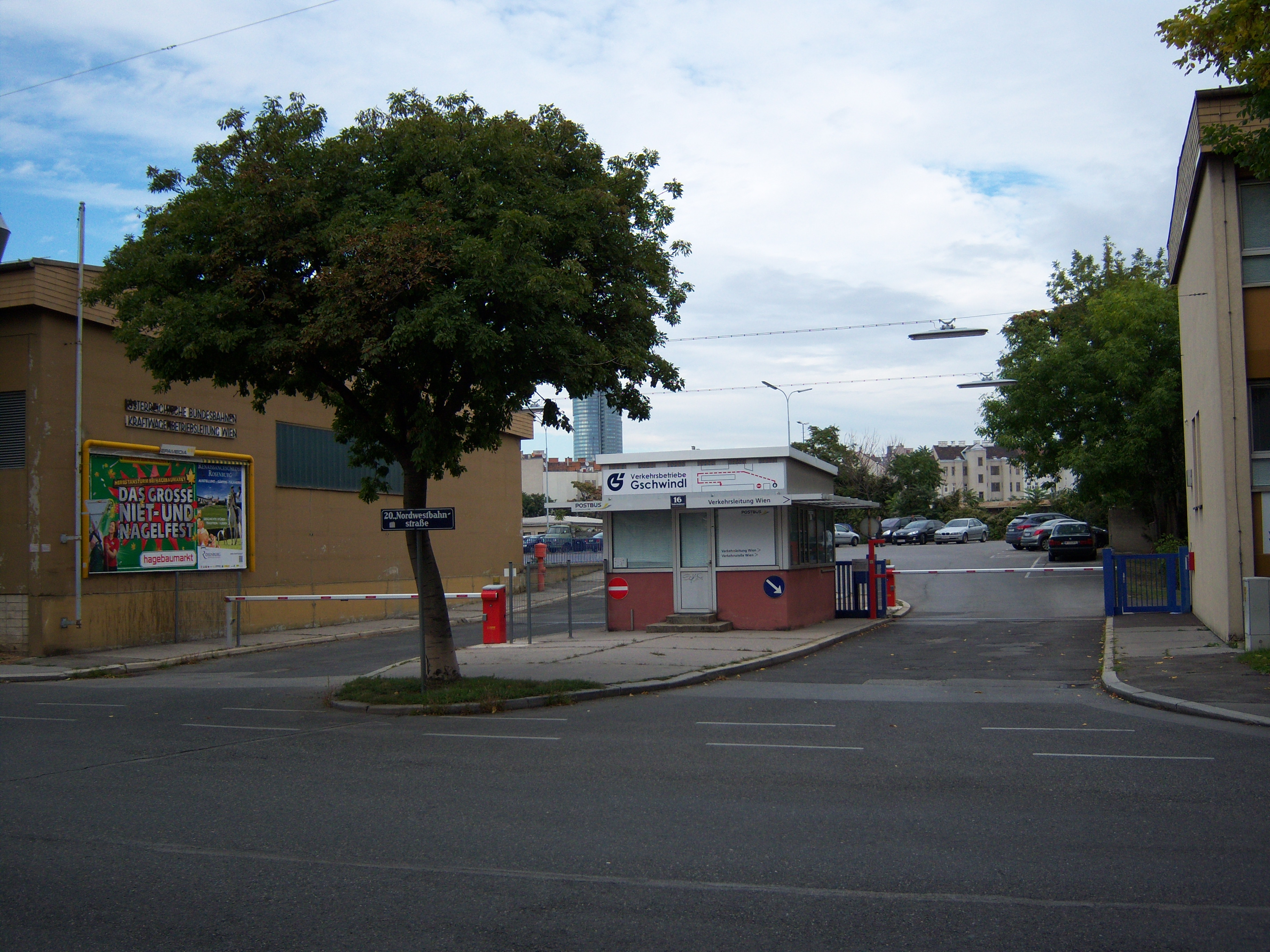 Zentrale der Gschwindl Buslinien in der Nordwestbahnstraße